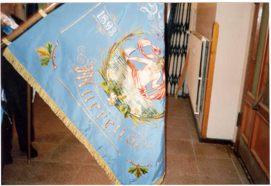 Flagge vom Schifferverein Neptun 1899 (eigene Arbeit)